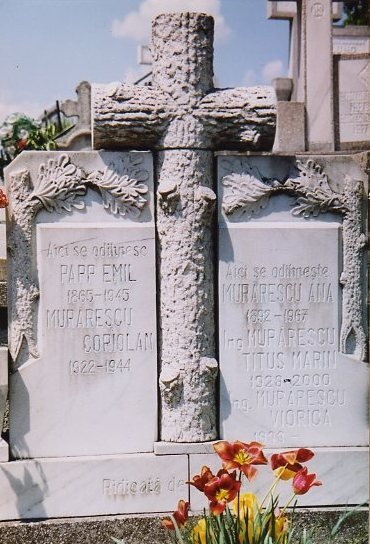 Crucea mormintelor familiei Murarescu din satul Brad, Romania